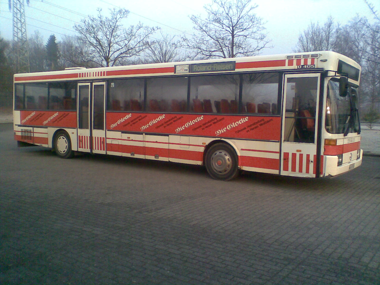 Dies ist der Deutschlandweit letzte (von ehemals fünf gebauten Exemplaren) in Betrieb befindliche Mercedes-Benz Ü80 (Prototyp des O407)(Stand Juli 2011). 1982 erschienen von Mercedes die ersten Ü 80 genannten Überlandprototypen des VÖV-II-Busses. Der abgebildete Bus begann seine Erprobungslaufbahn 1982 bei den Verkehrsbetrieben Hamburg-Holstein als Wagen 8238 und läuft heute noch bei Firma Drügemüller aus Beckum. Mercedes-Benz ließ seine S-80- und Ü-80-Prototypen übrigens bei den Fahrzeugwerken Falkenried bauen. (Übrigens ist der "O405"-Aufkleber über der Fronttür nicht richtig, da dieser Ü80 ja eigentlich der Prototyp des O407 ist. Der Aufkleber wurde wohl mal nachträglich an dem Fahrzeug angebracht.)